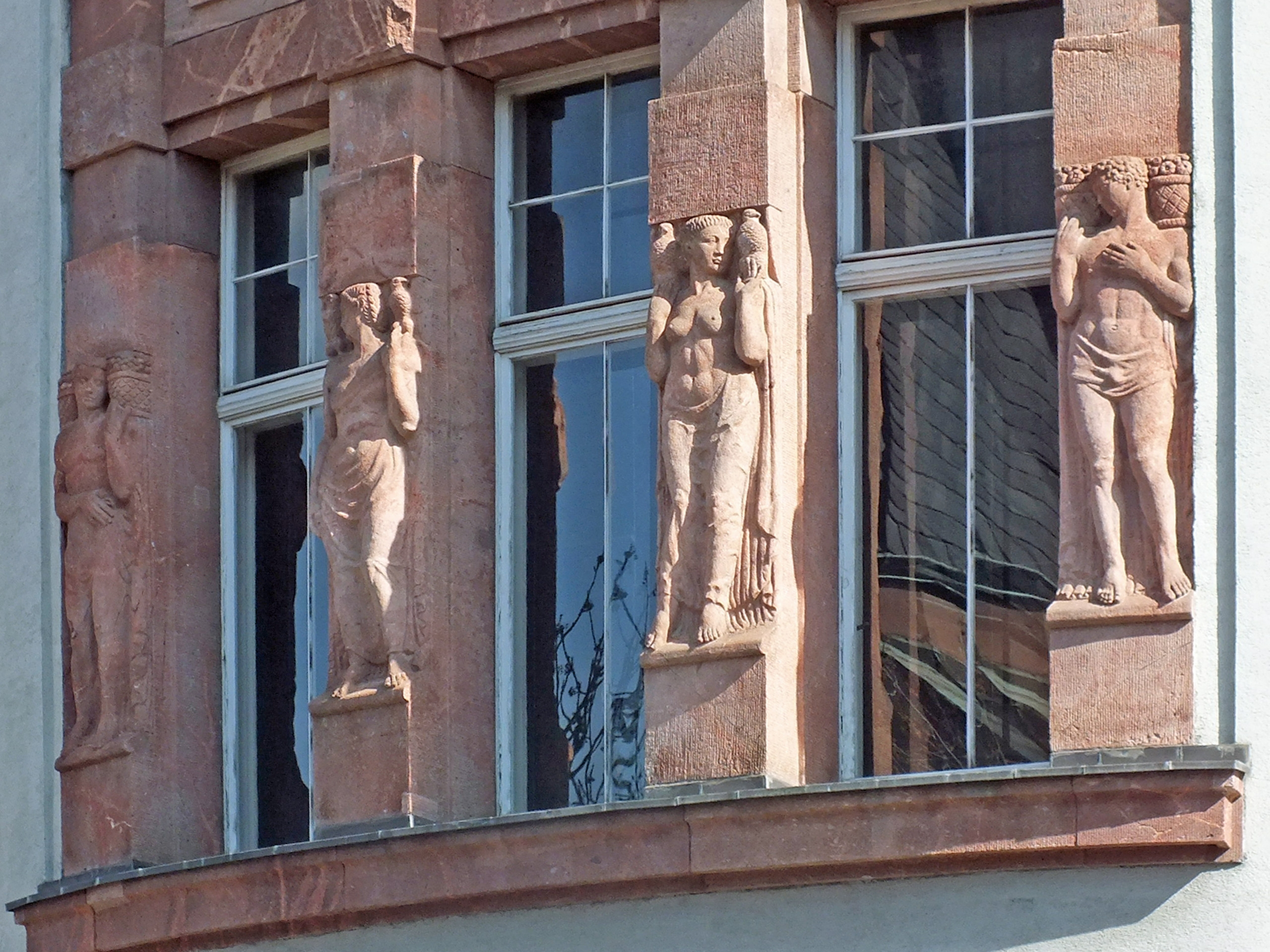 Bauplastik des Dresdner Bildhauers Georg Wrba am Gebäude der ehemaligen Handelshochschule Leipzig, Ritterstraße 8/10 (heutiges Geschwister-Scholl-Haus der Universität Leipzig)